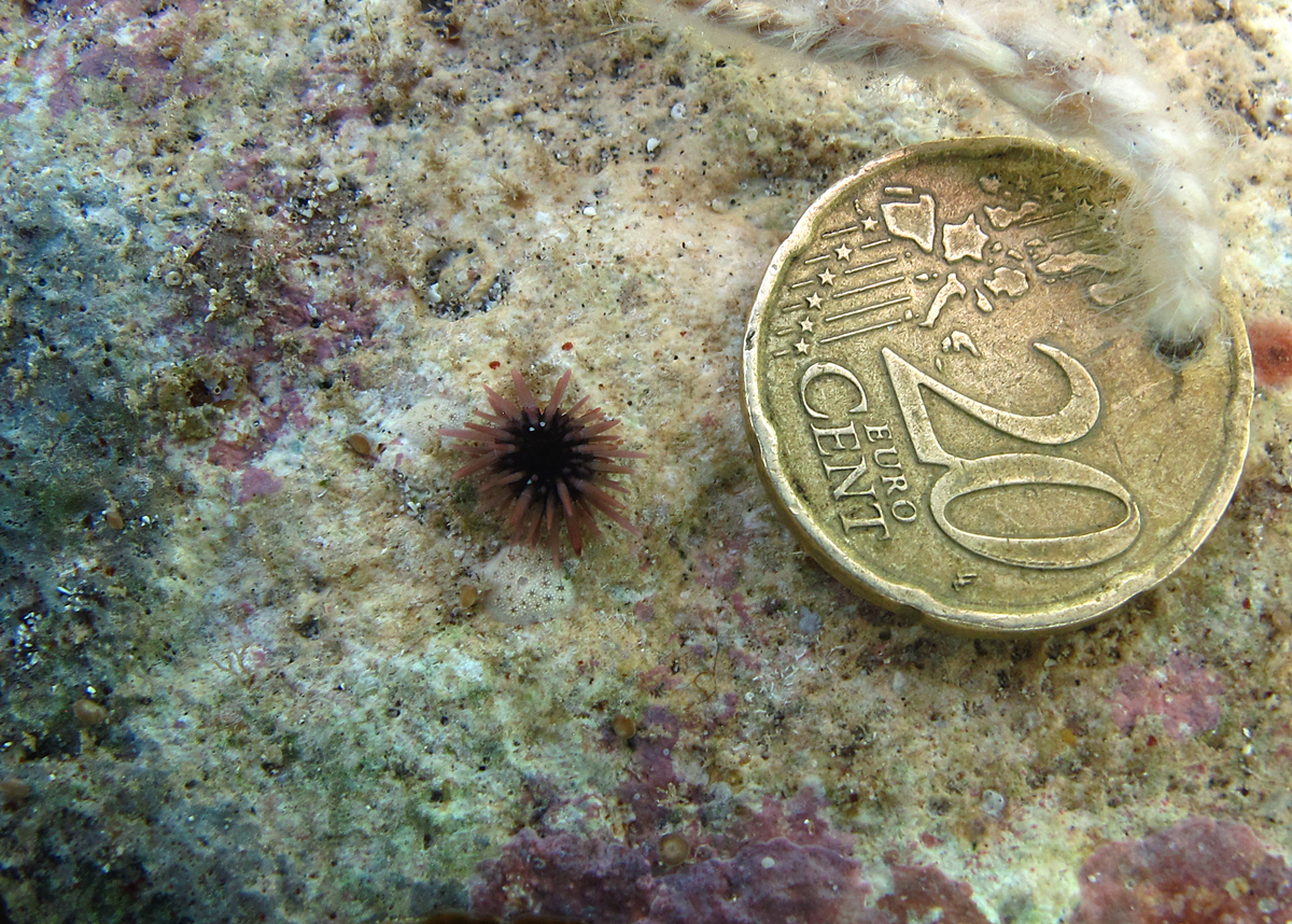 Un minuscule juvénile d'oursin perforant (Echinometra mathaei) à la Réunion.